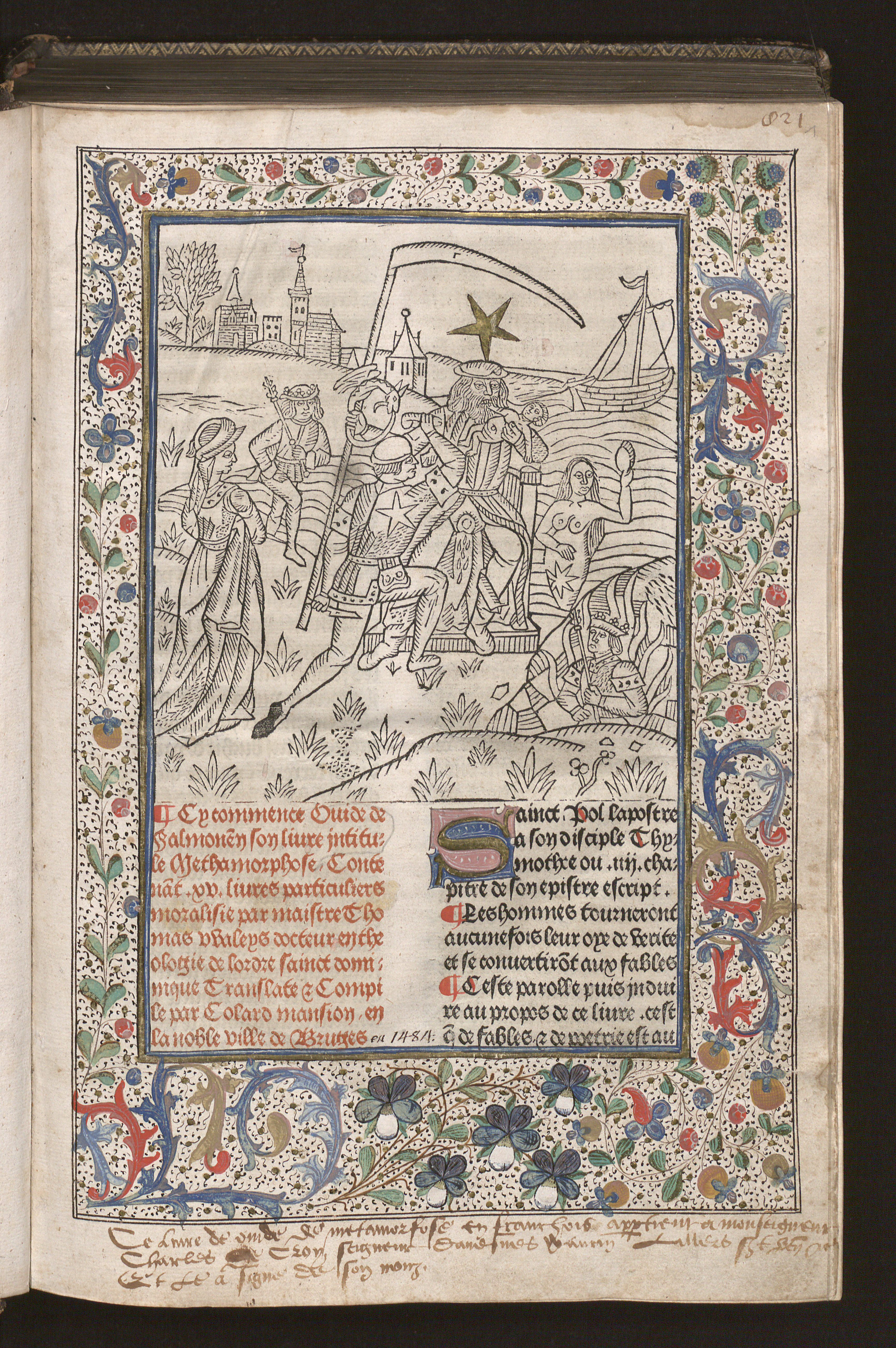 Luxe-uitgave van de Franse prozabewerking van de Metamorfosen van Ovidius. Gedrukt en geïllustreerd (met houtsneden en met de hand verlucht) in Brugge door Colard Mansion.